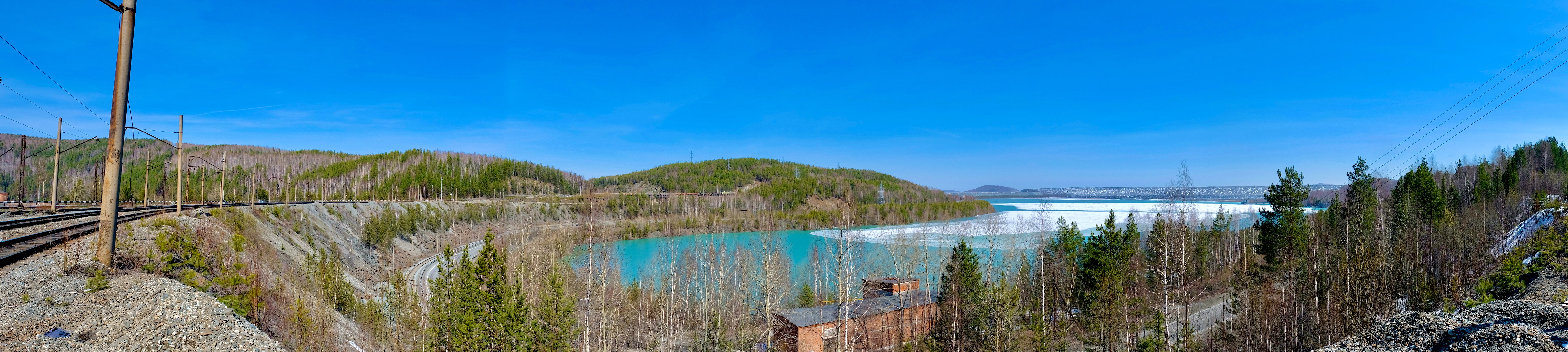 Панорама разделительной дамбы, по которой проложен ж/д путь, и отсека осветлённой воды шламохранилища Качканарского ГОКа